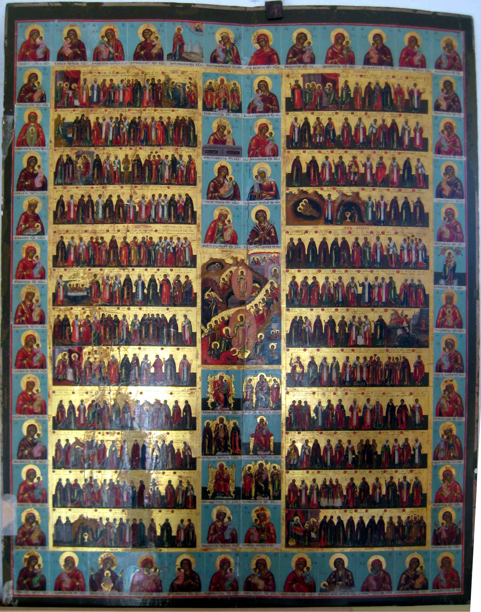 Воскрешение Христово и Сошествие во ад с полугодовой минеей и чтимыми образами Богородицы